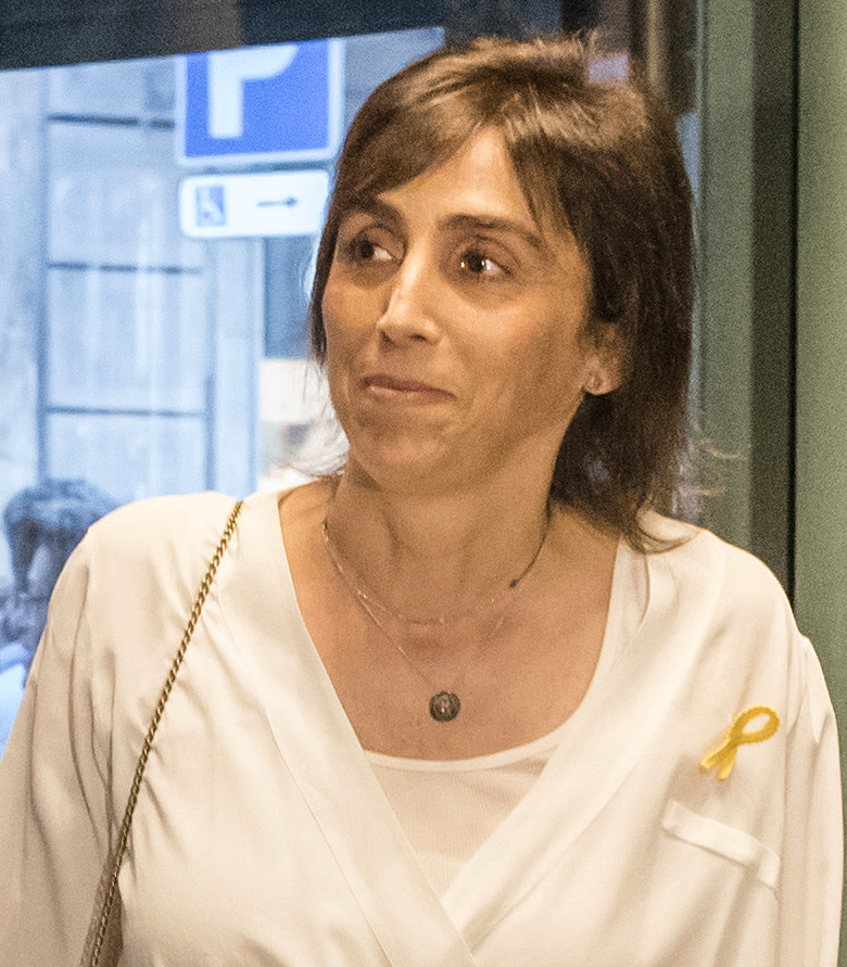 Quim Monzó rep el 50è Premi d'Honor de les Lletres Catalanes al Palau de la Música Catalana el 4 de juny de 2018. Per primera vegada a la història d'Òmnium, el president no pot entregar el guardó al premiat: Jordi Cuixart és a la presó des del 16 d'octubre de 2017.